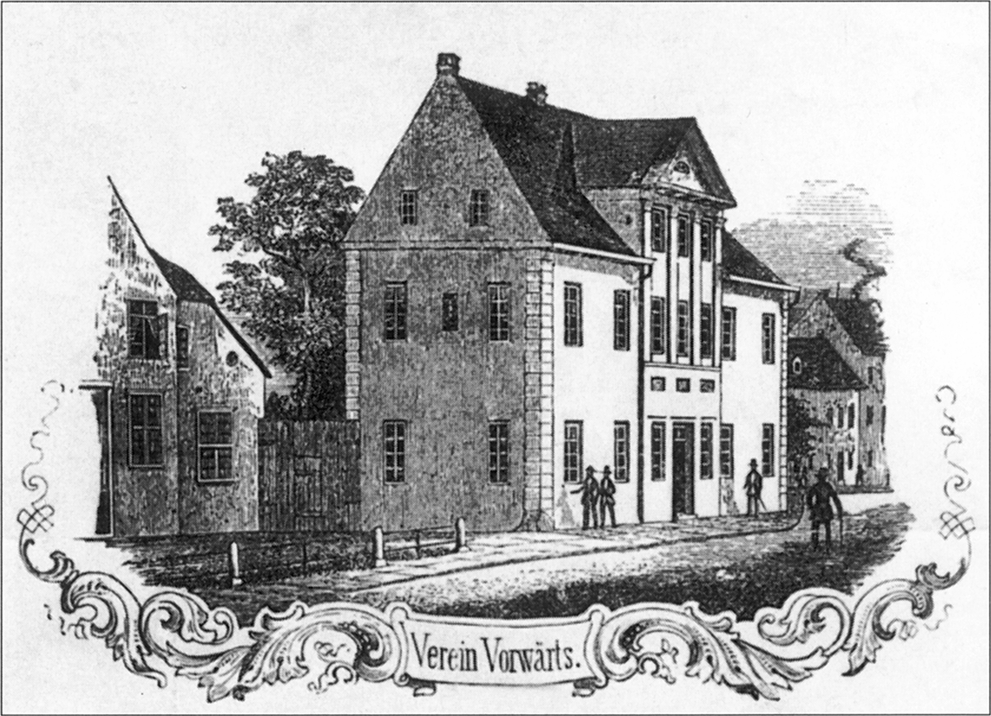 Bremen: Haus Vorwärts in der Sandstraße. Lithografie von 1865